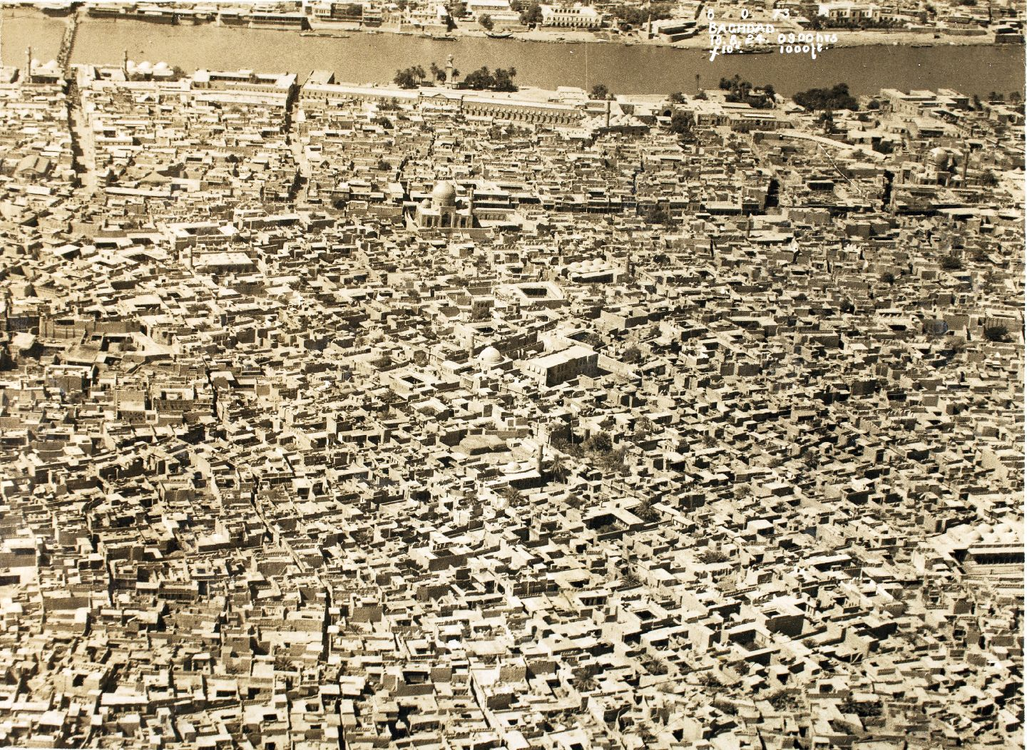 بغداد في عام 1924 حيث يظهر جانب الرصافة ونهر دجلة